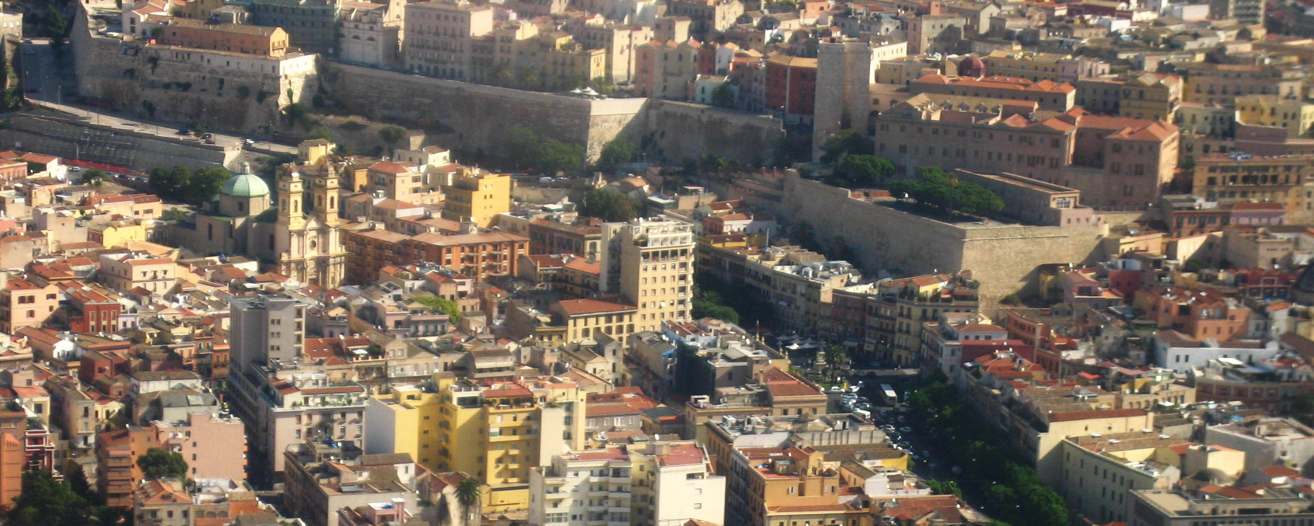 Vista su Stampace e le mura di Castello